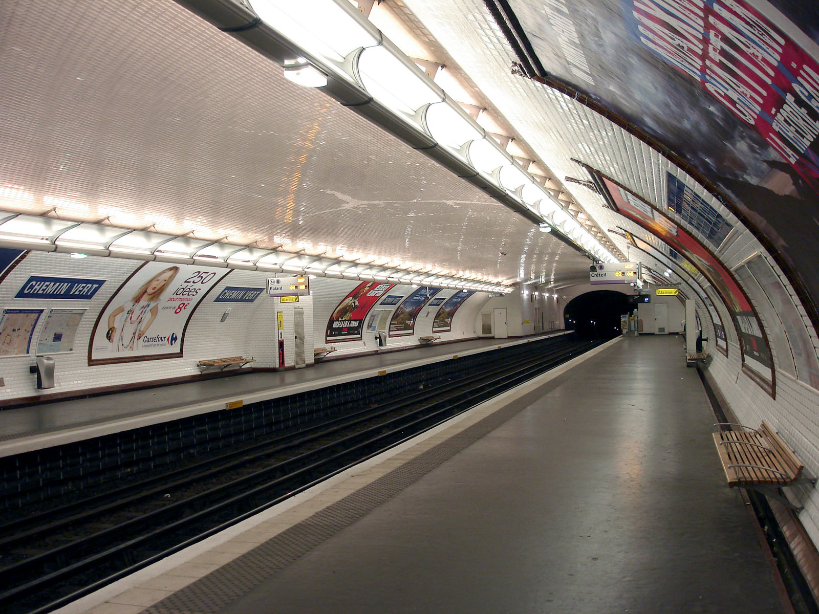 La station Chemin Vert de la ligne 8 du métro de Paris, France